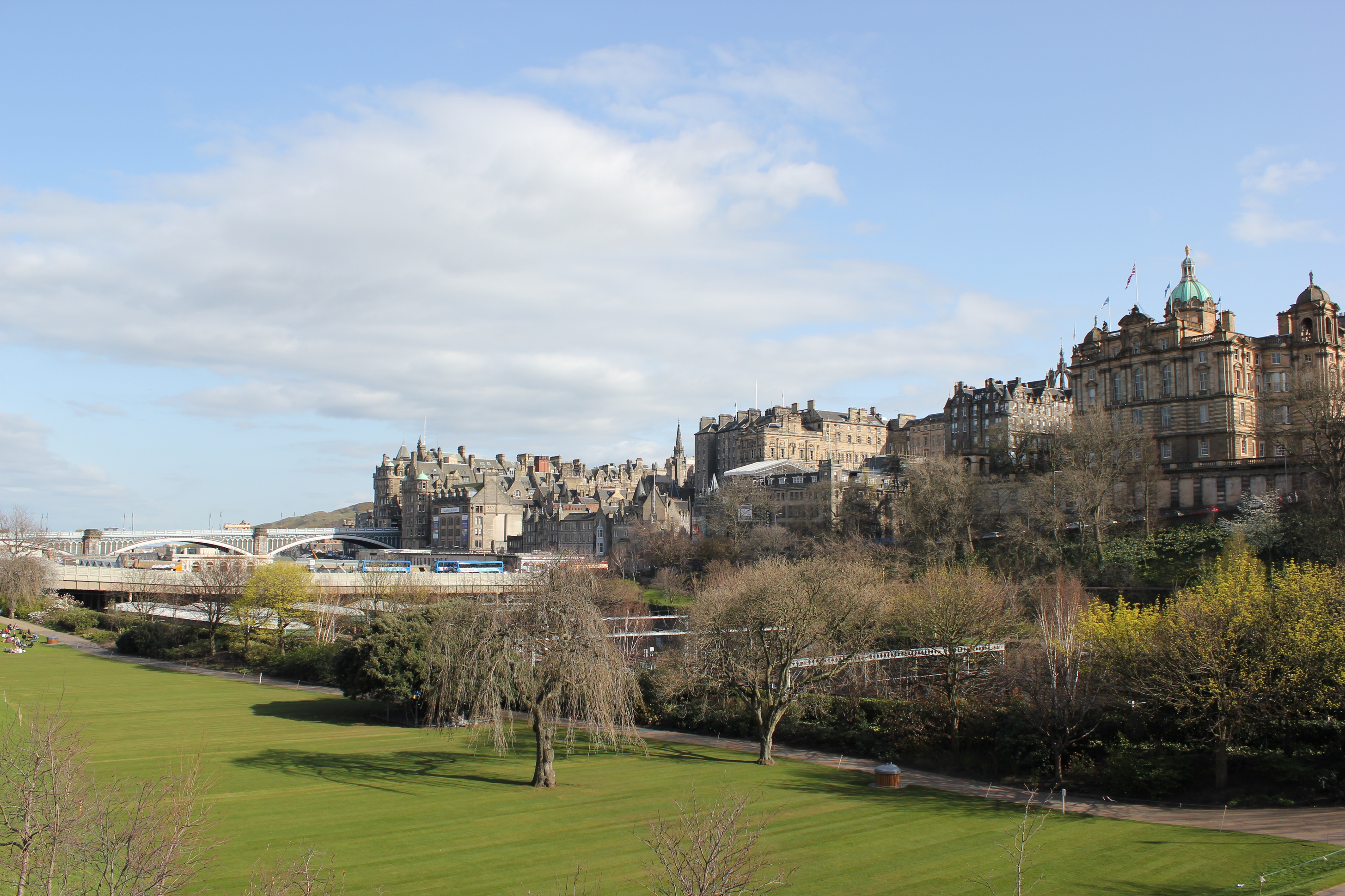 Blick über Princes Street Gardens auf die Altstadt der schottischen Hauptstadt Edinburgh.